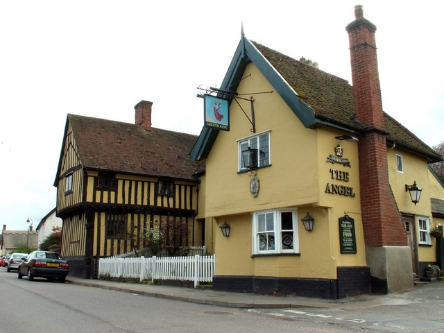 'The Angel' inn, Glemsford, Suffolk